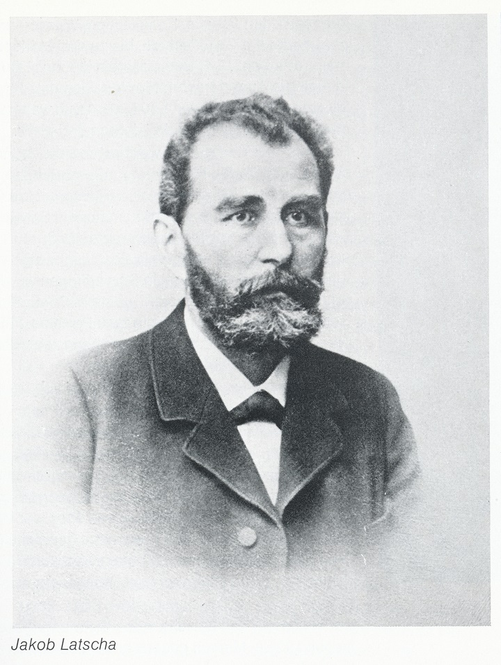 Porträt Jakob Latschas